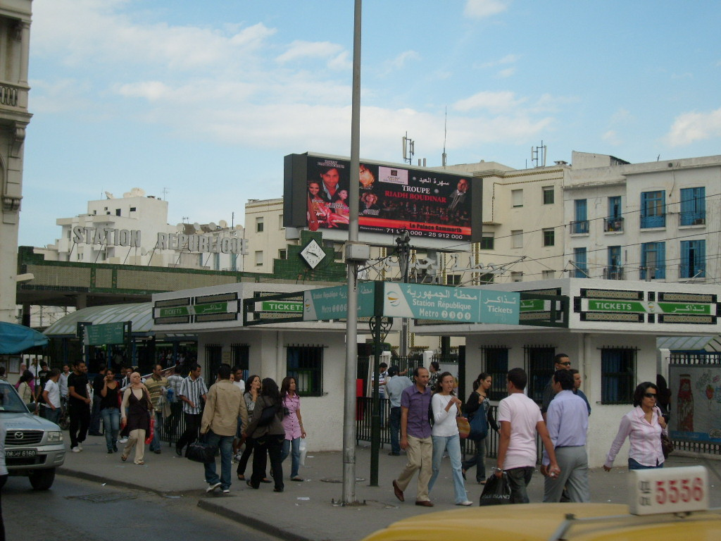 Station République du métro léger de Tunis